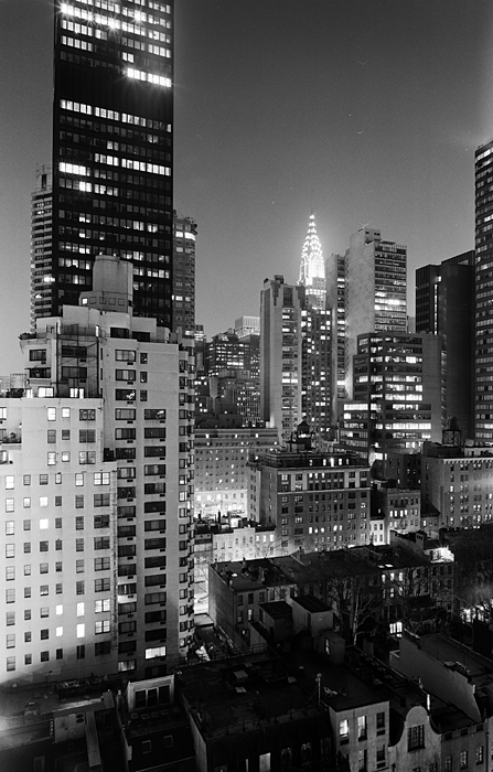 Foto kujutab öise Manhattani vaadet